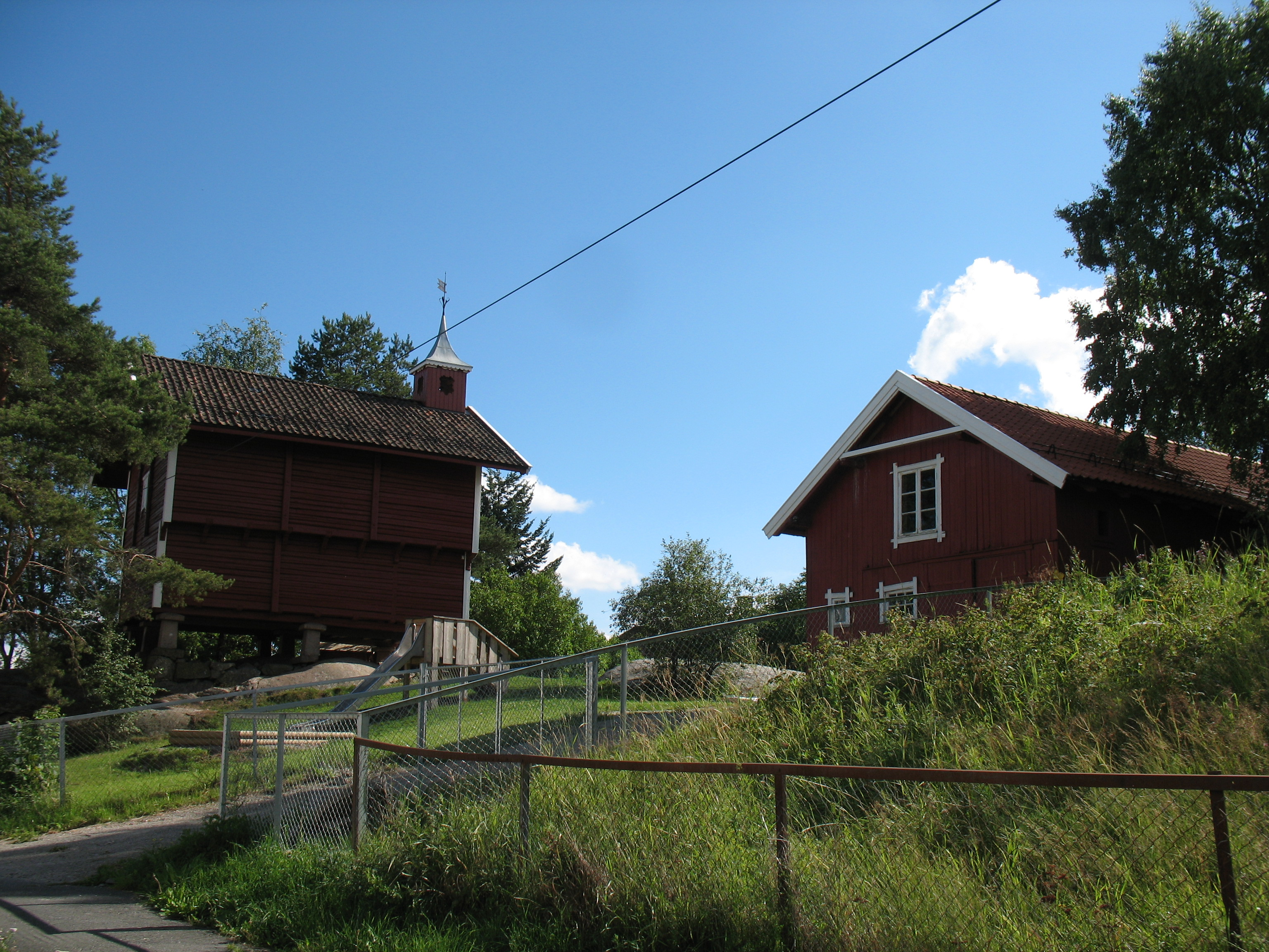 Rustad gård i Oslo.